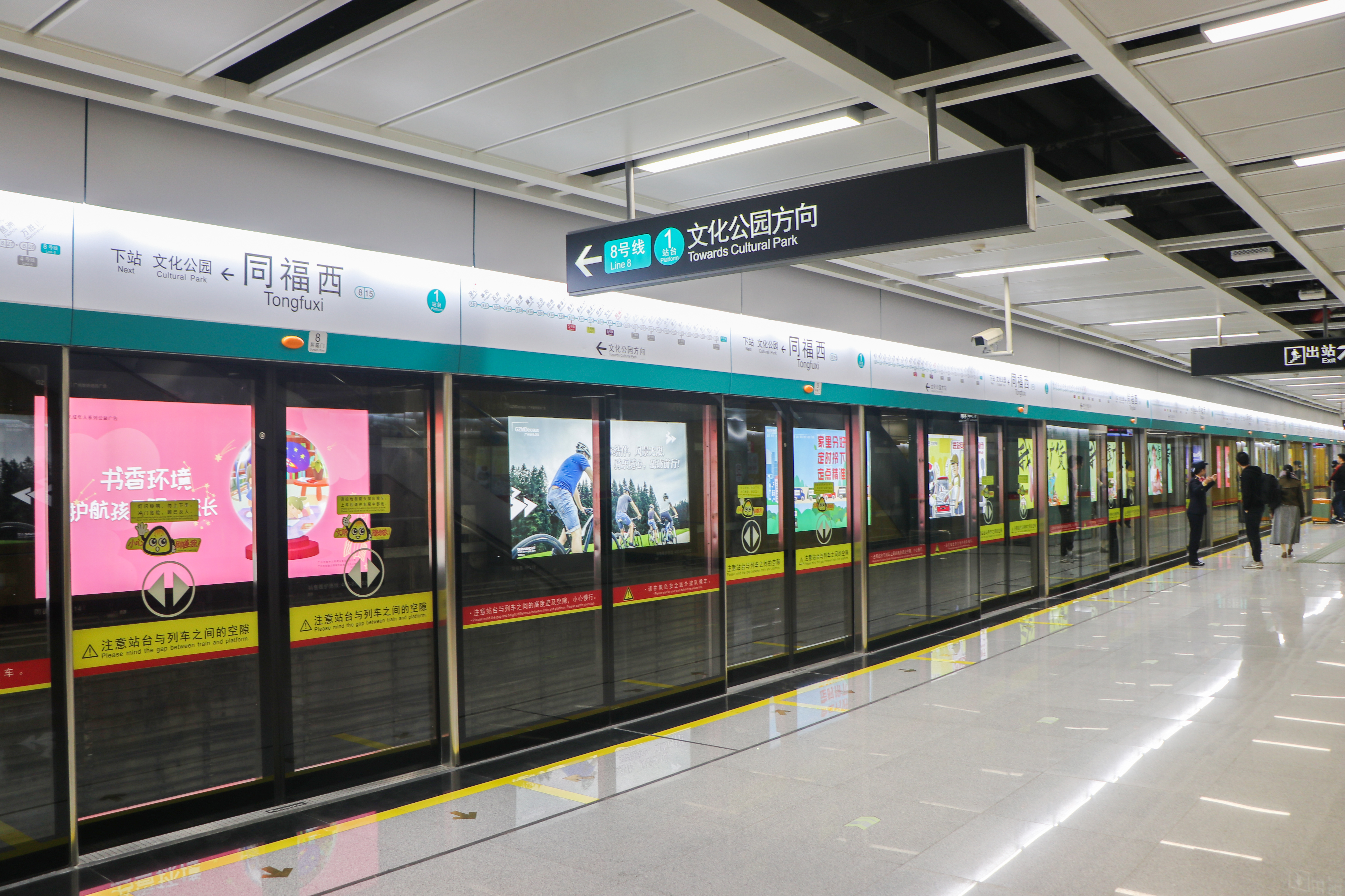 广州地铁同福西站